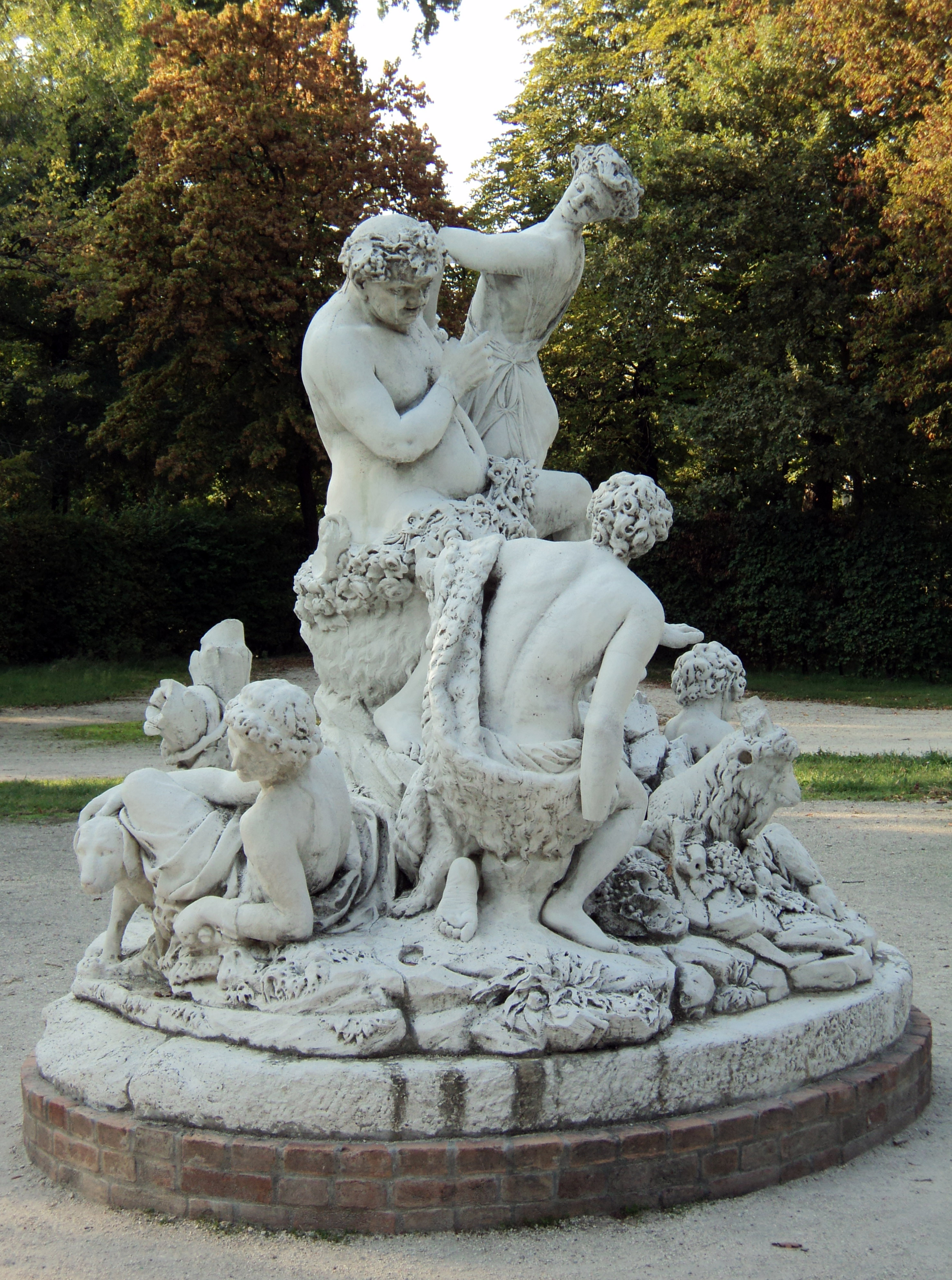 Parco Ducale This is a photo of a monument which is part of cultural heritage of Italy.